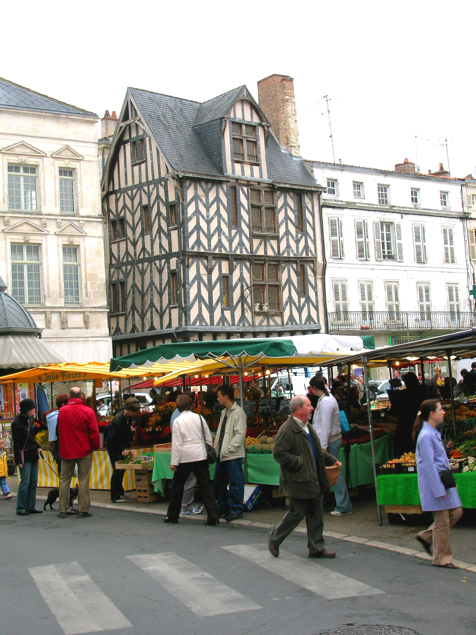 La Rochelle, de Maart